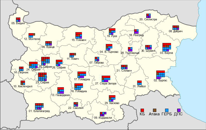 Парламентарни избори в България през 2013: депутатски места по район